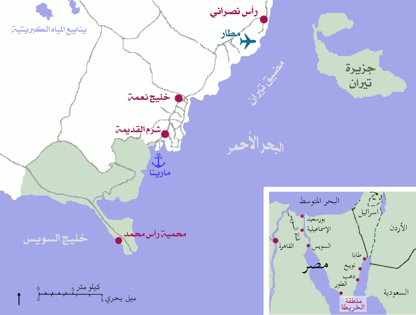 خريطة شرم الشيخ بمصر